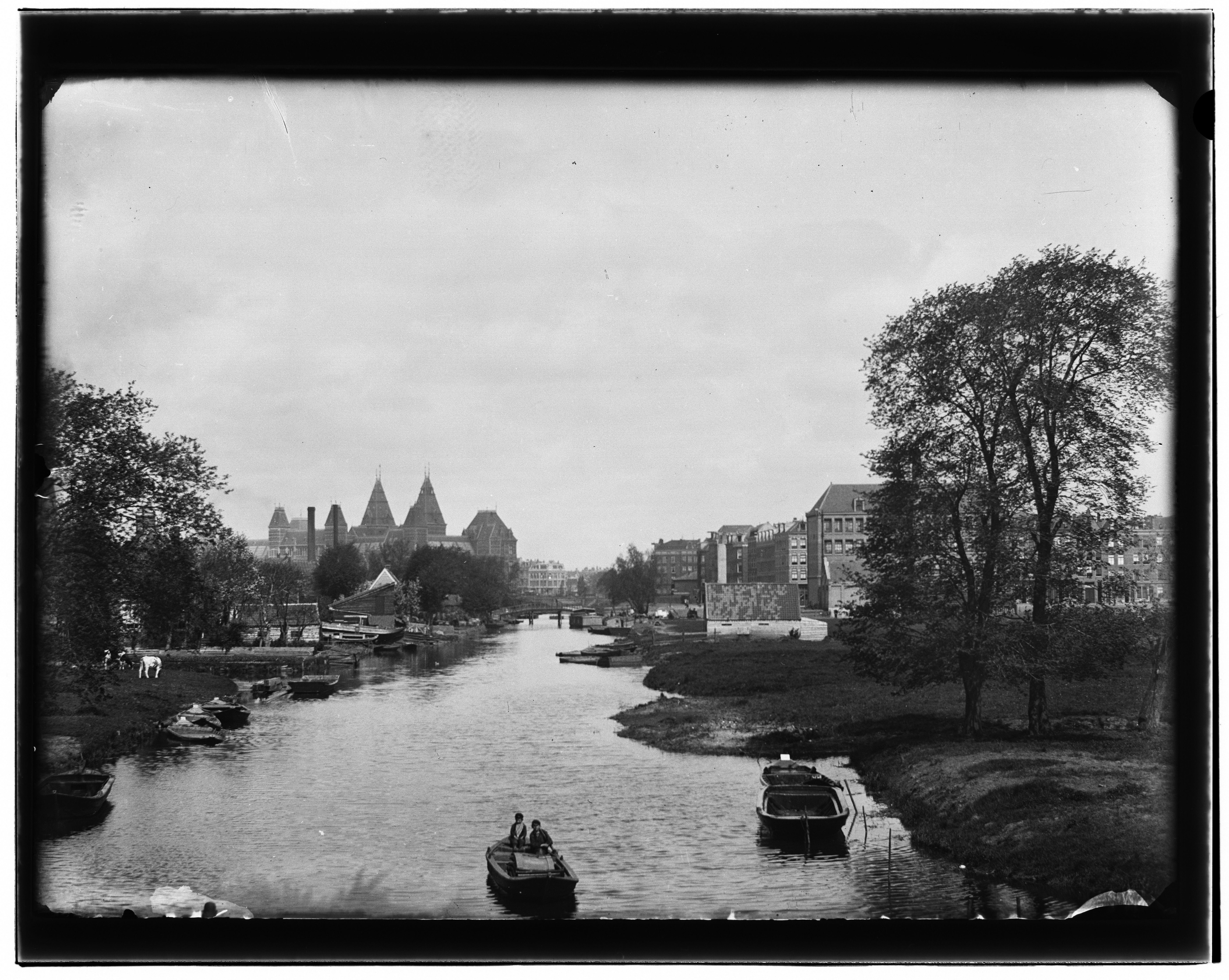 Beschrijving Boerenwetering Gezien vanaf de brug voor de Rustenburgerstraat in noordelijke richting naarhet Rijksmuseum``, Stadhouderskade 42 (links) en de nieuwbouw van de Pijp(rechts). Rechterdeel van een tweedelig panorama. Documenttype foto Vervaardiger Olie``, Jacob (1834-1905) Collectie Collectie Jacob Olie Jbz. Datering 1891 Geografische naam Boerenwetering Inventarissen Afbeeldingsbestand 10019A000913 Generated with Dememorixer